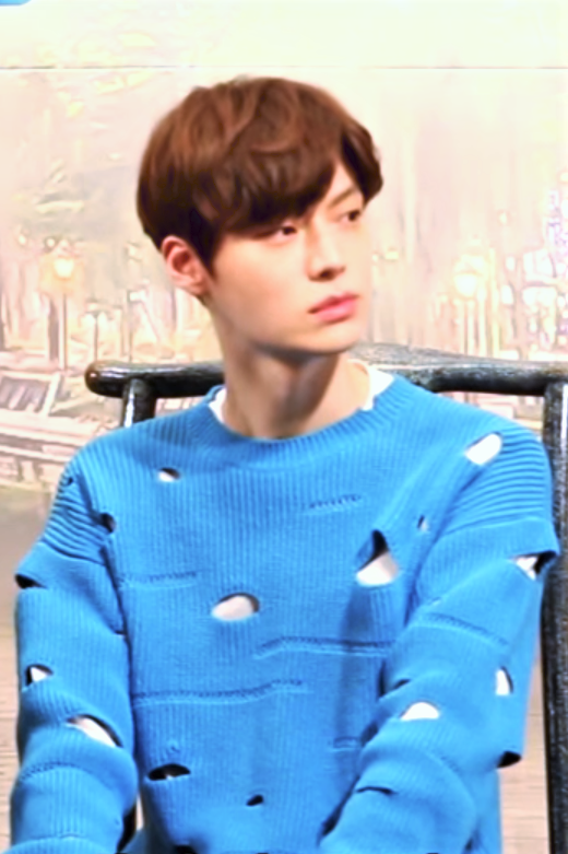 tvN go '신서유기2' 제작발표회